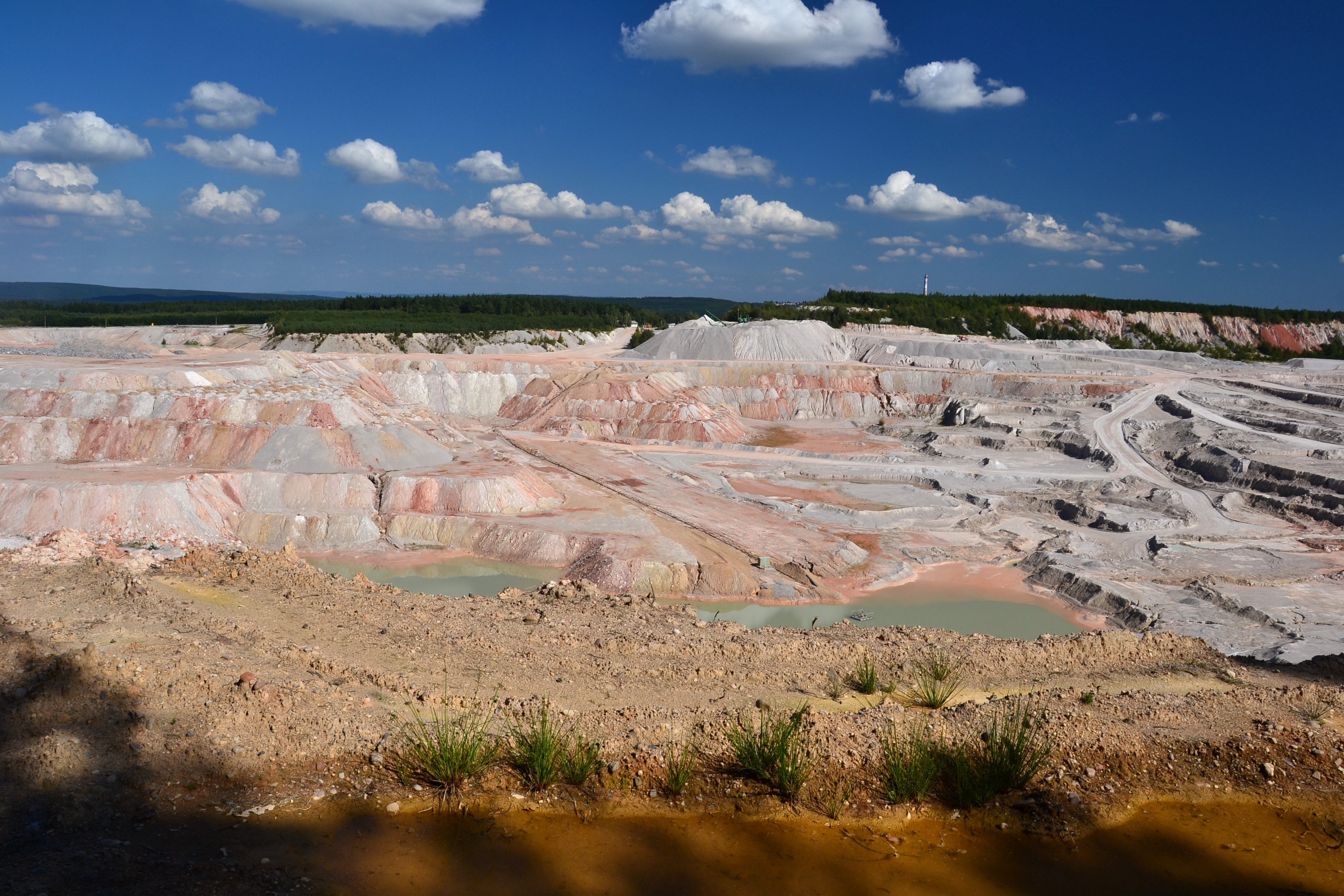 Kaolin quarry near Kaznějov